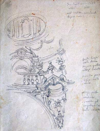 Giovanni Vacchetta, disegno delle decorazioni della volta del presbiterio, chiesa parrocchiale di Melle (CN).